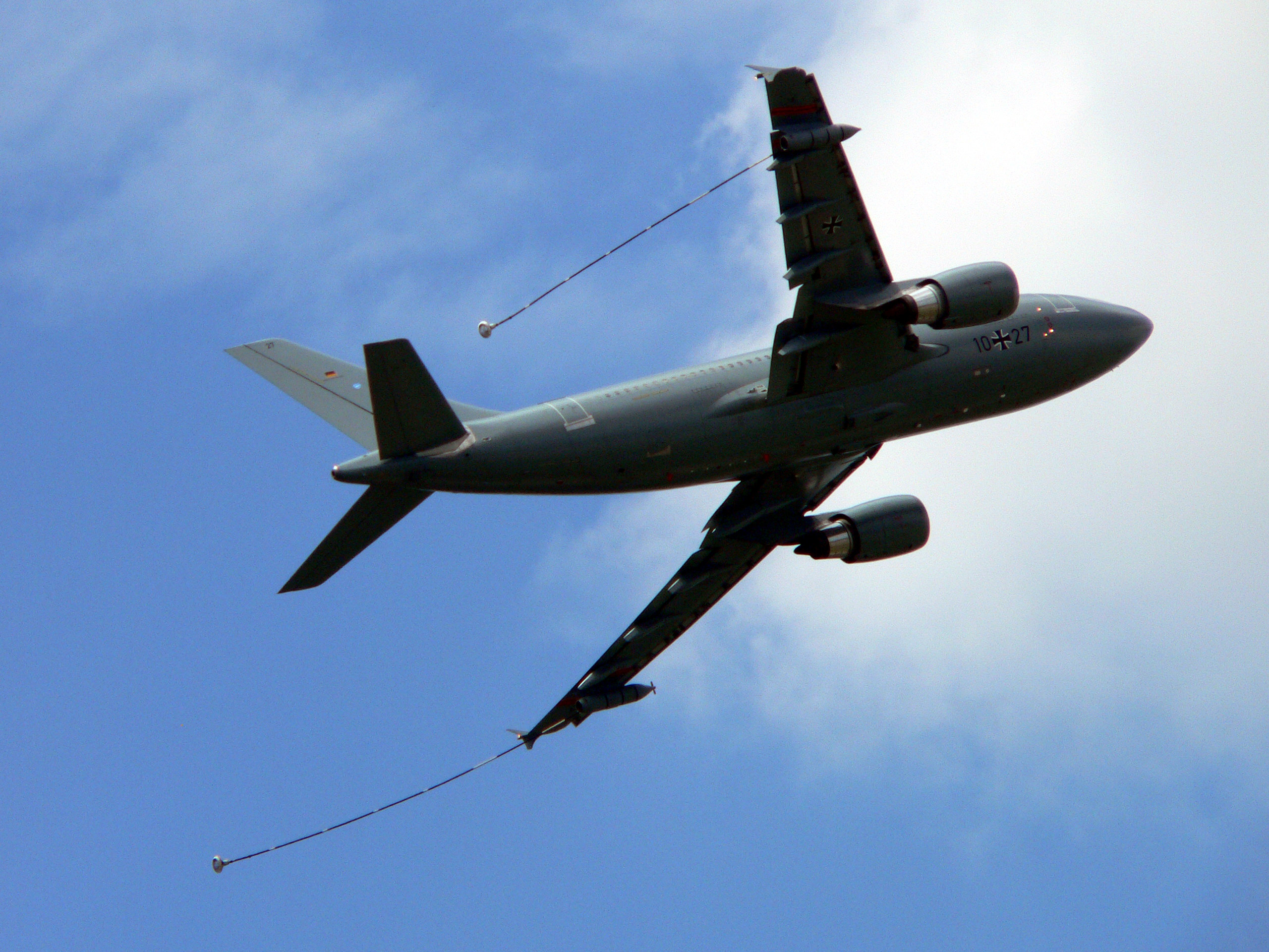 Airbus A310 MRTT, German Luftwaffe